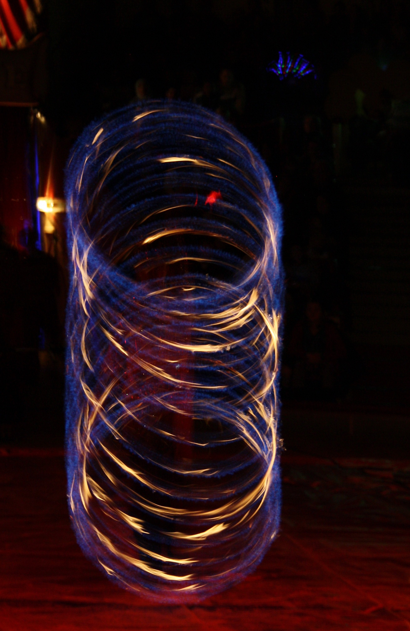 Duo Somalas - Feuerspucker aus Deutschaland. Rotiereder Stab mit Flammen an den Enden.